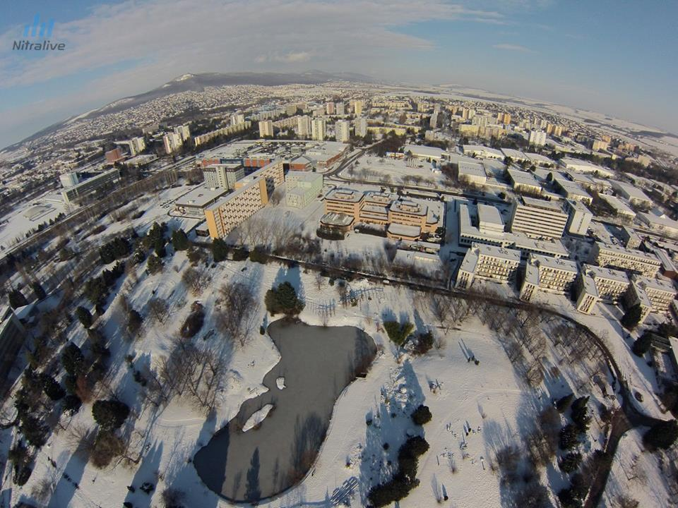 Chrenova